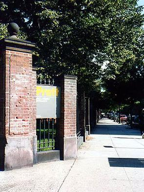 紐約布魯克林的普瑞特藝術學院,Prattflora拍的